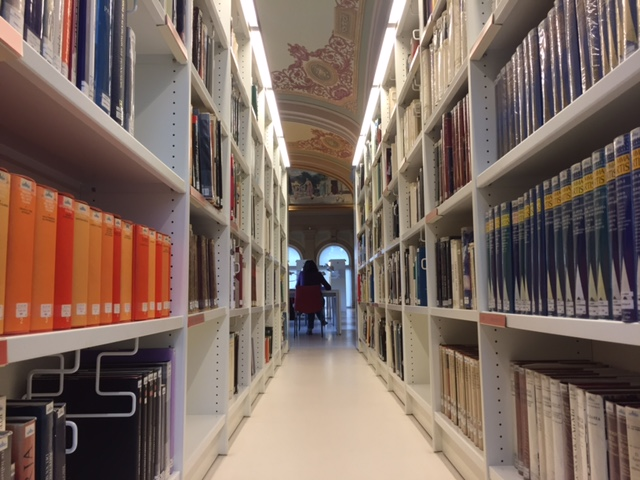 Biblioteca del MNAC 2016